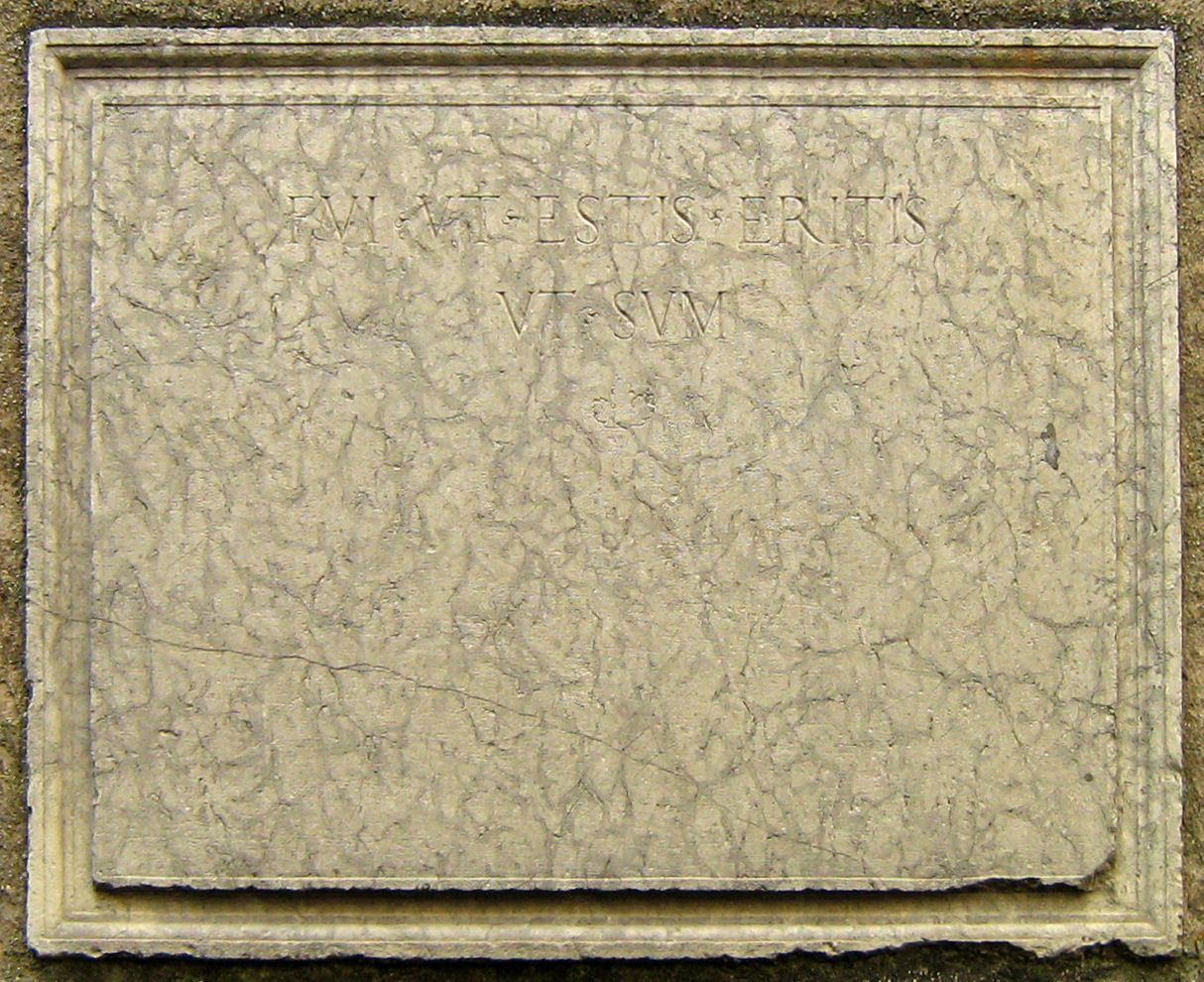 Castel Goffredo, epigrafe aloysiana.